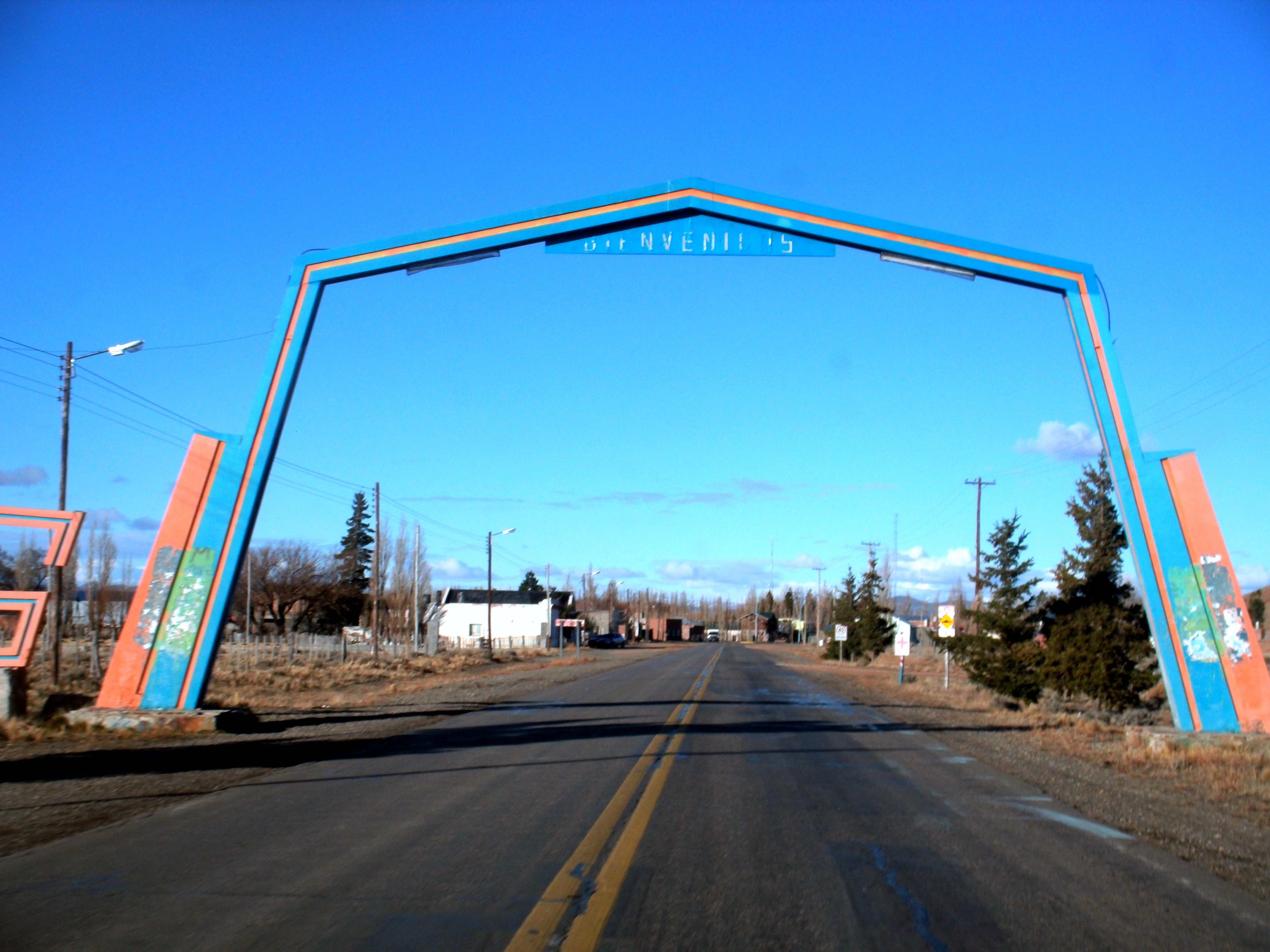 Cartel de ingreso al poblado